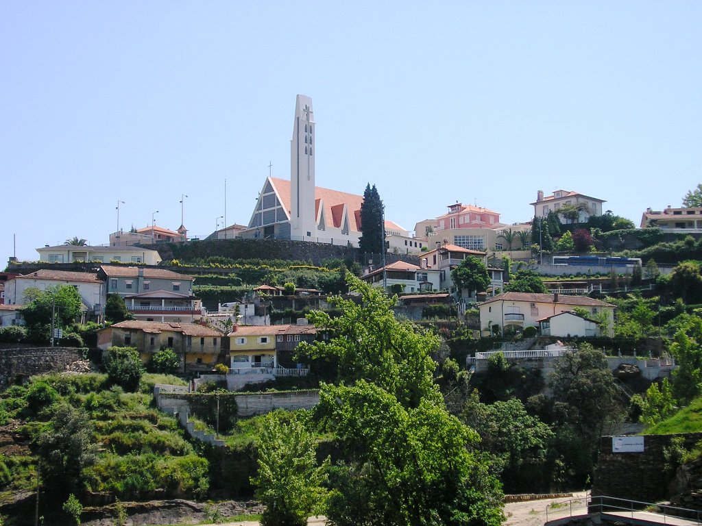 Crestuma church, Vila Nova de Gaia municipality, Portugal